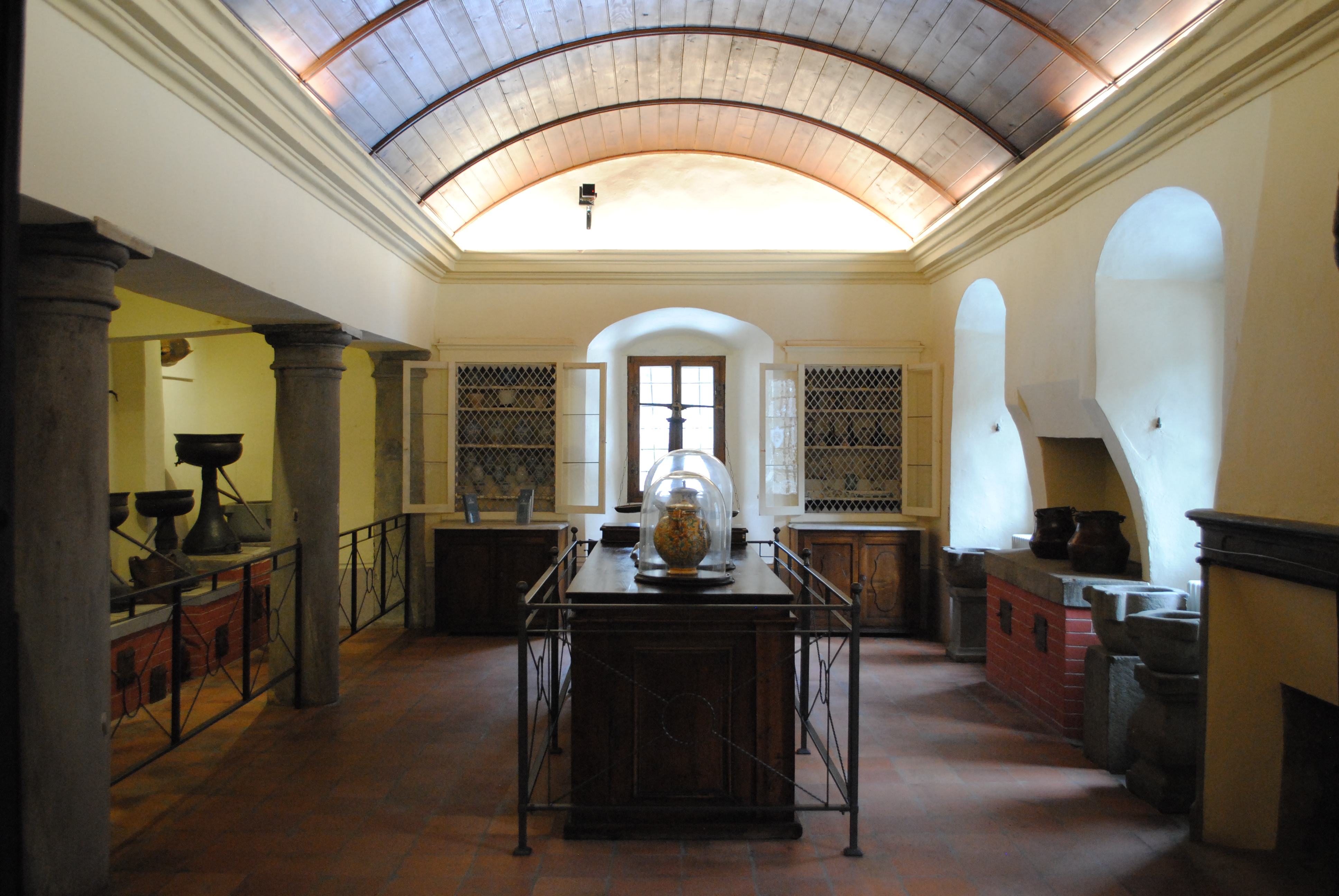 Interno del gabinetto galenico nell'antica farmacia di Camaldoli